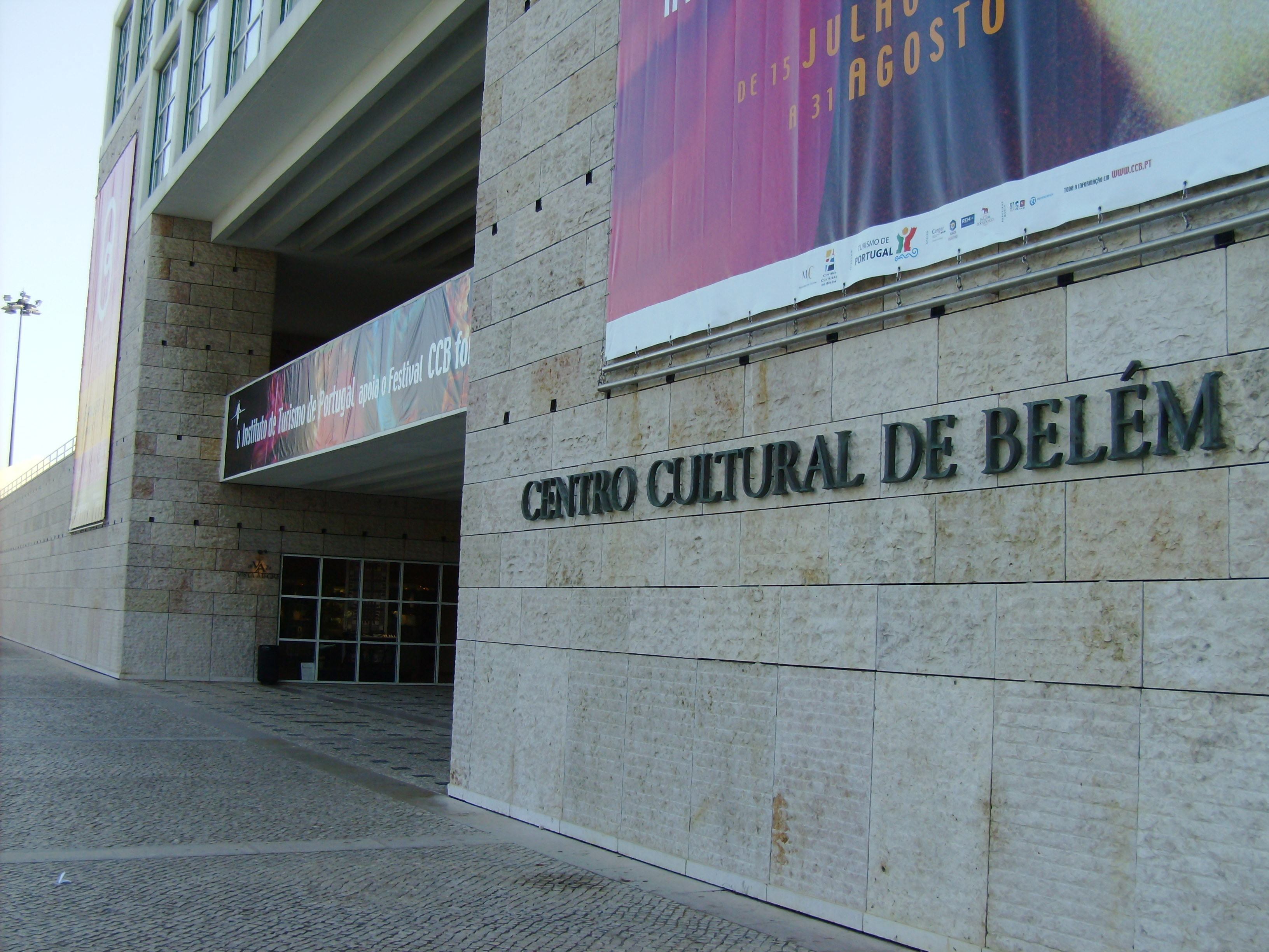 Centro Cultural de Belém, Lisboa, Portugal.